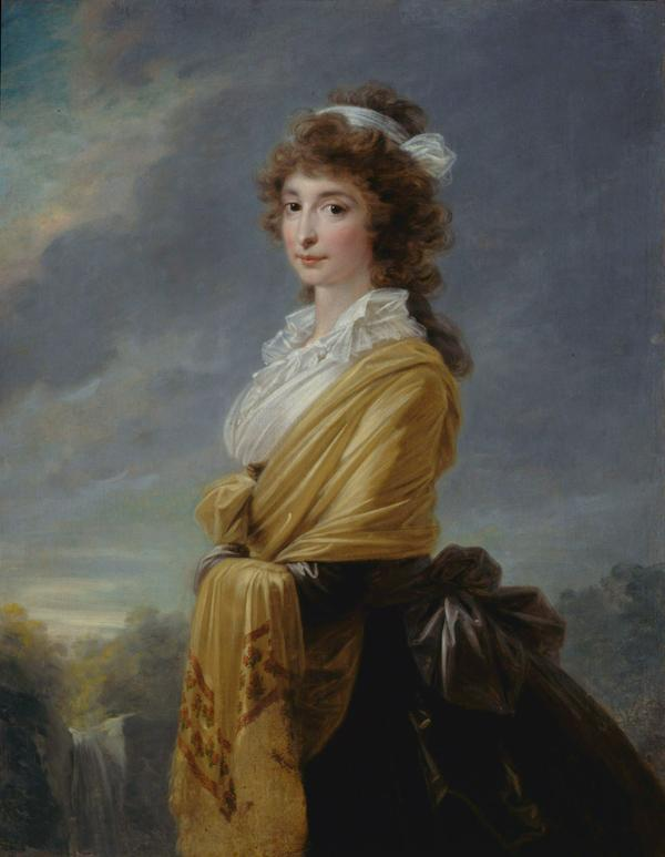 Графиня Елизавета Тун-Гогенштейн (Елизавета Осиповна Разумовская) (1764-1806), жена графа Андрея Кирилловича Разумовского (1752-1836)